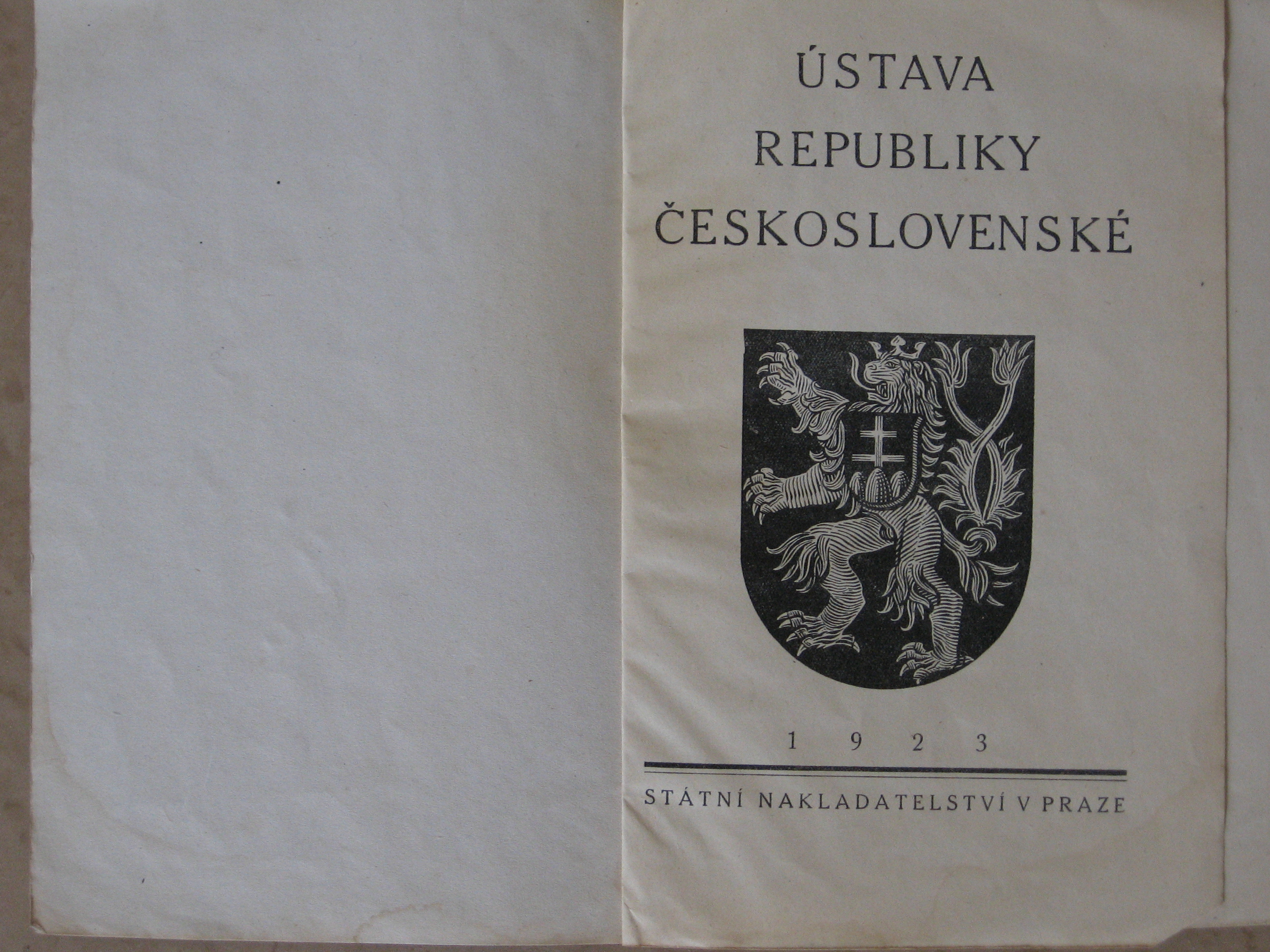 Vydání z roku 1923